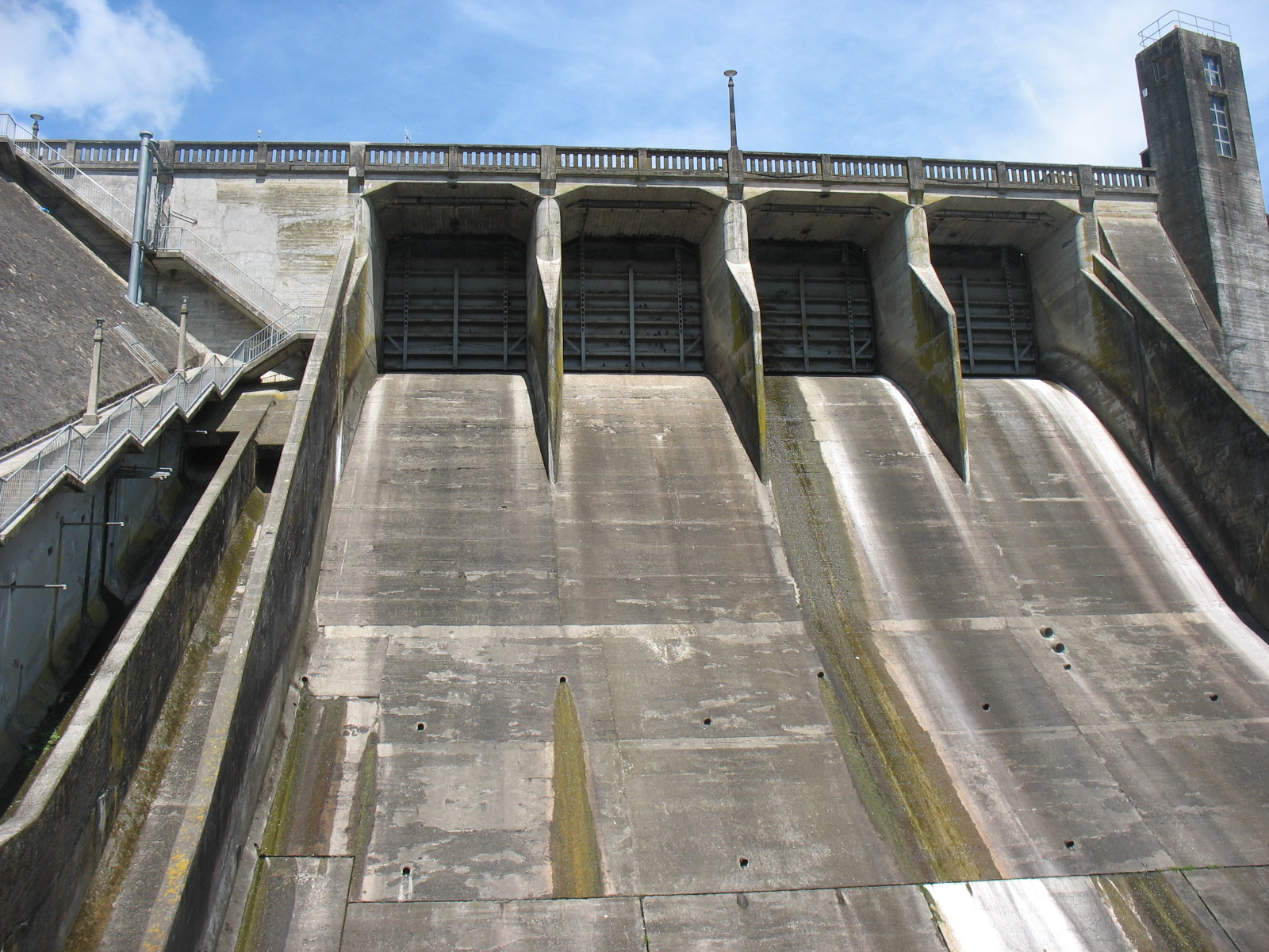 Karapiro Dam